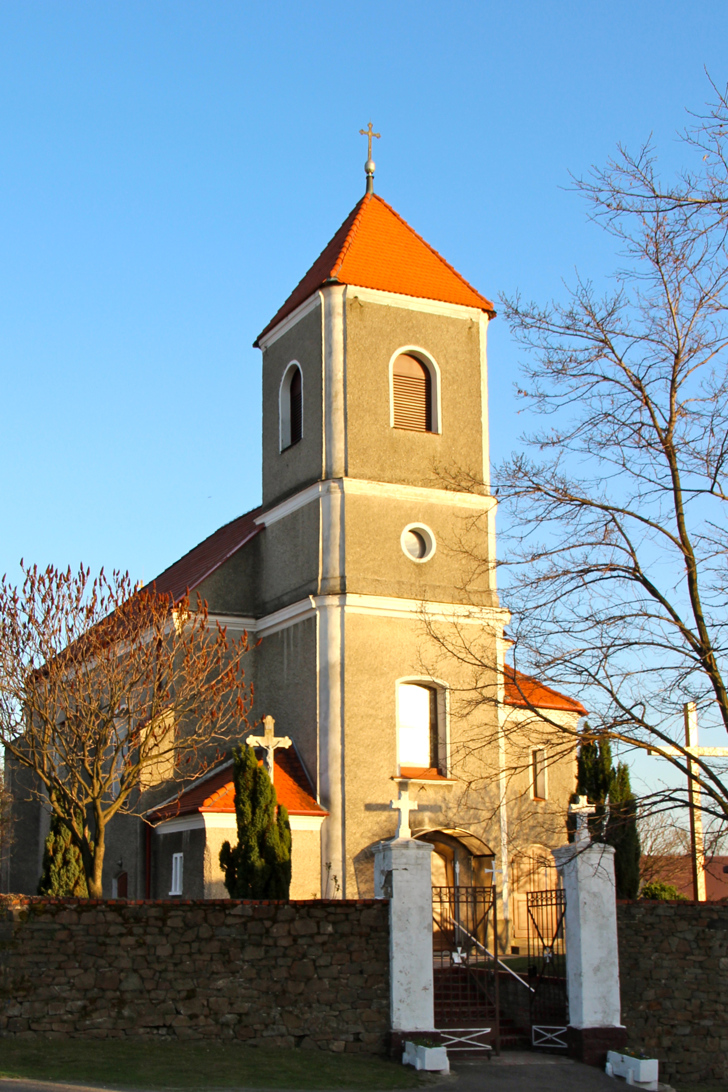 Zopowy – kościół pw. św. Michała Archanioła, 1613, XX